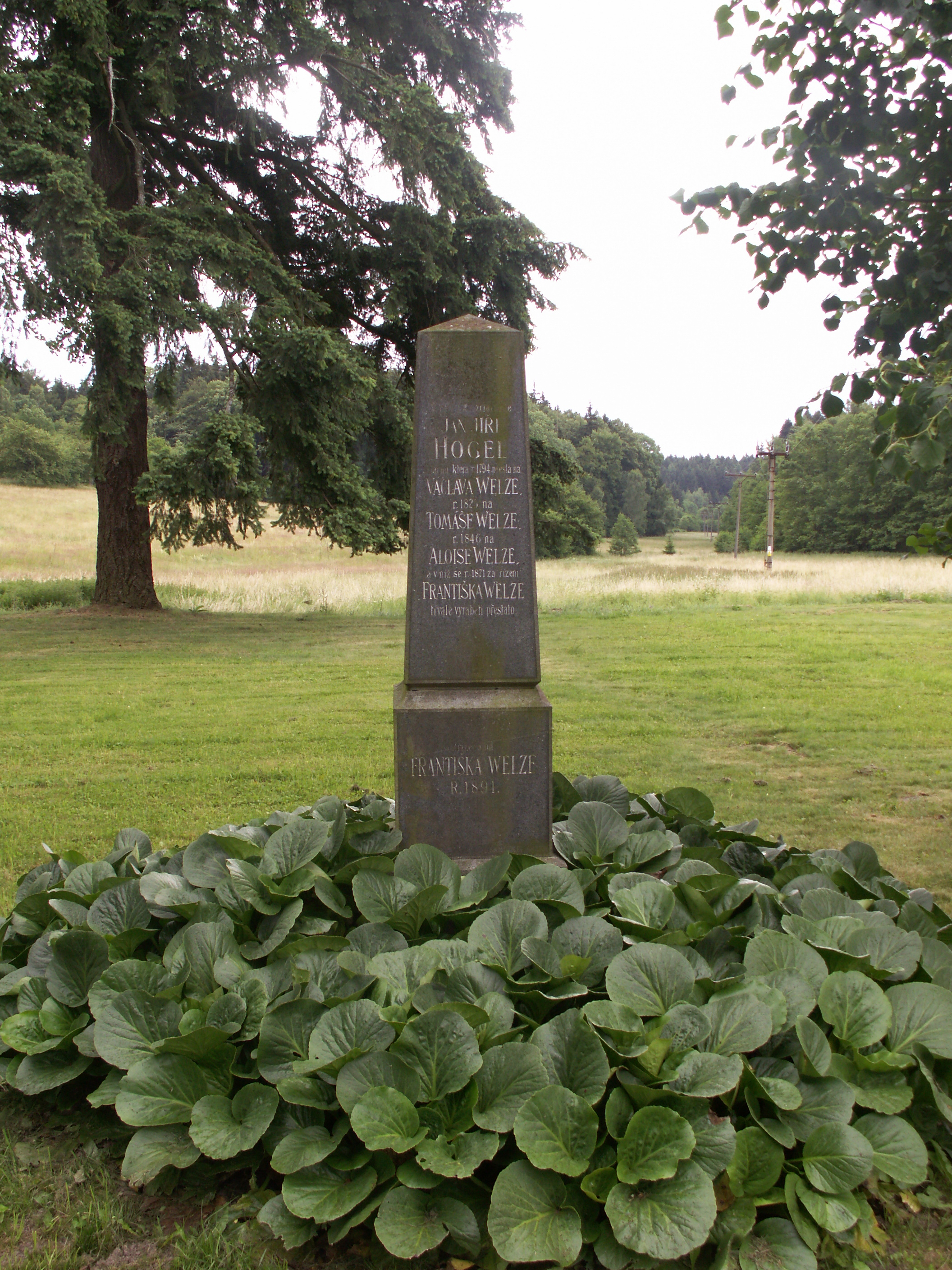 pomník majitelů skláren Dobrá Voda (část obce Malčín), okres Havlíčkův Brod